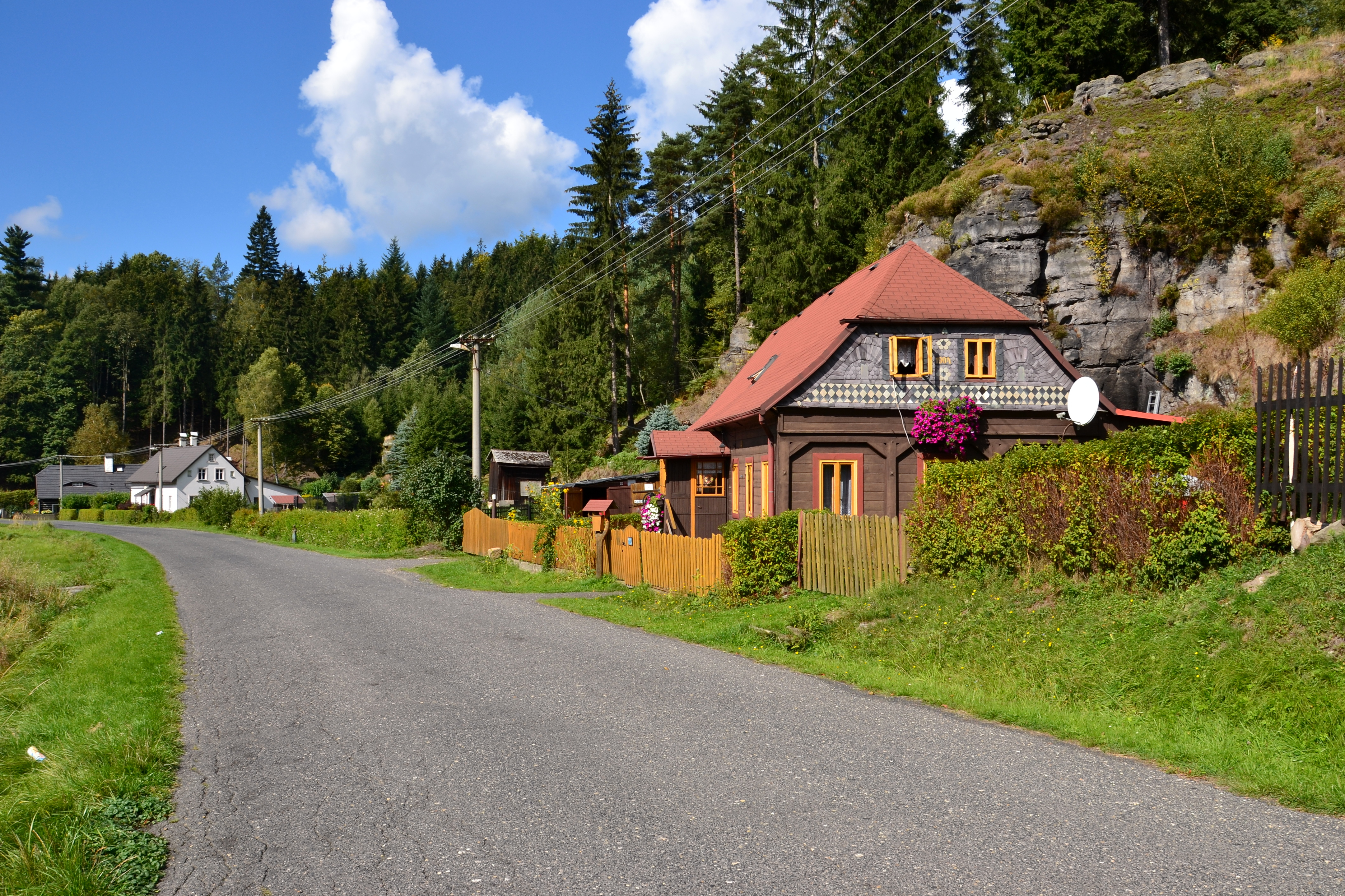 Domy u silnice k České Kamenici